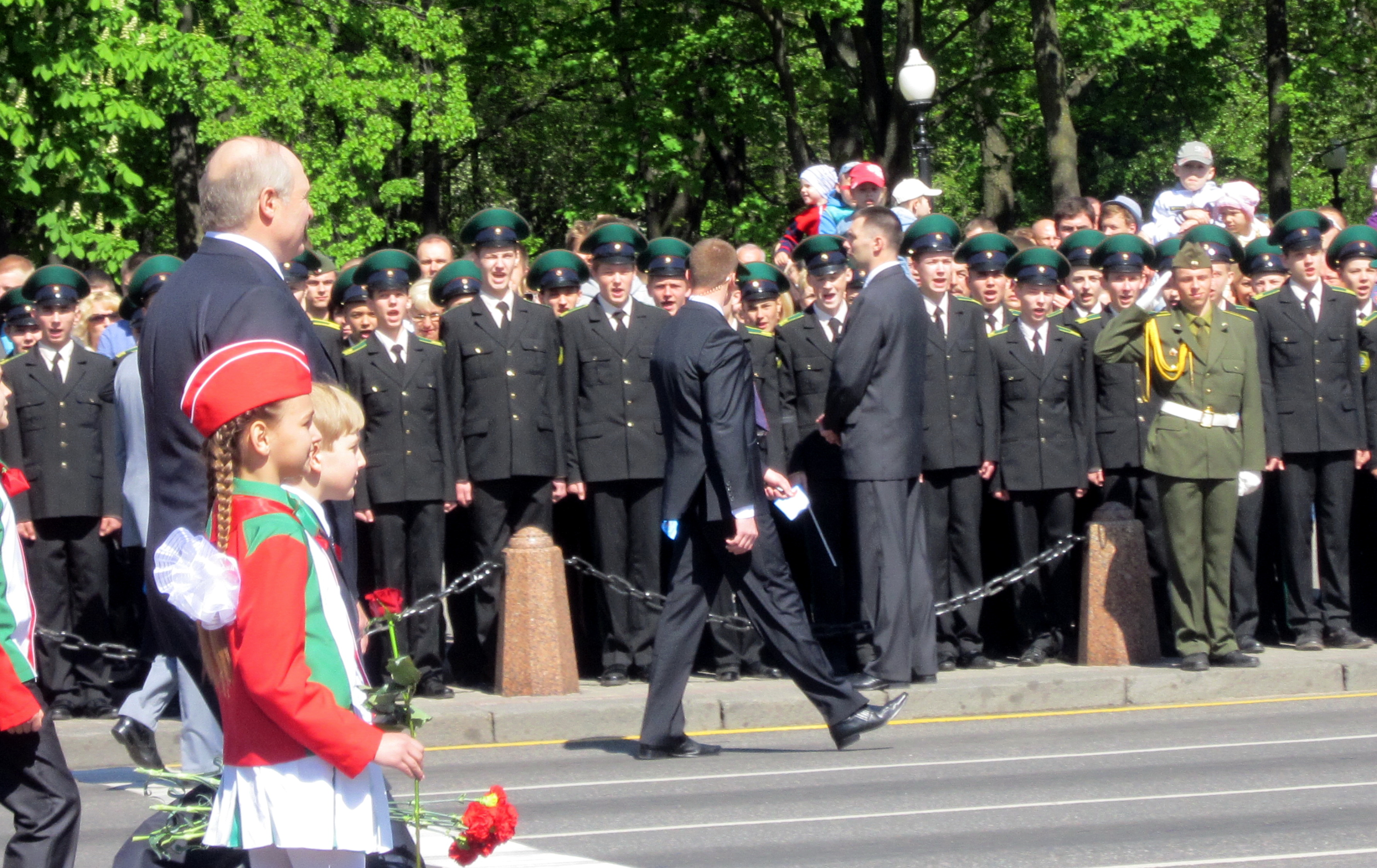 Президент РБ А. Г. Лукашенко на параде Победы проходит перед кадетами МГКУ №2 (пограничников), отдающими приветствие. Минск, пр. Независимости, 9 мая 2012 года.